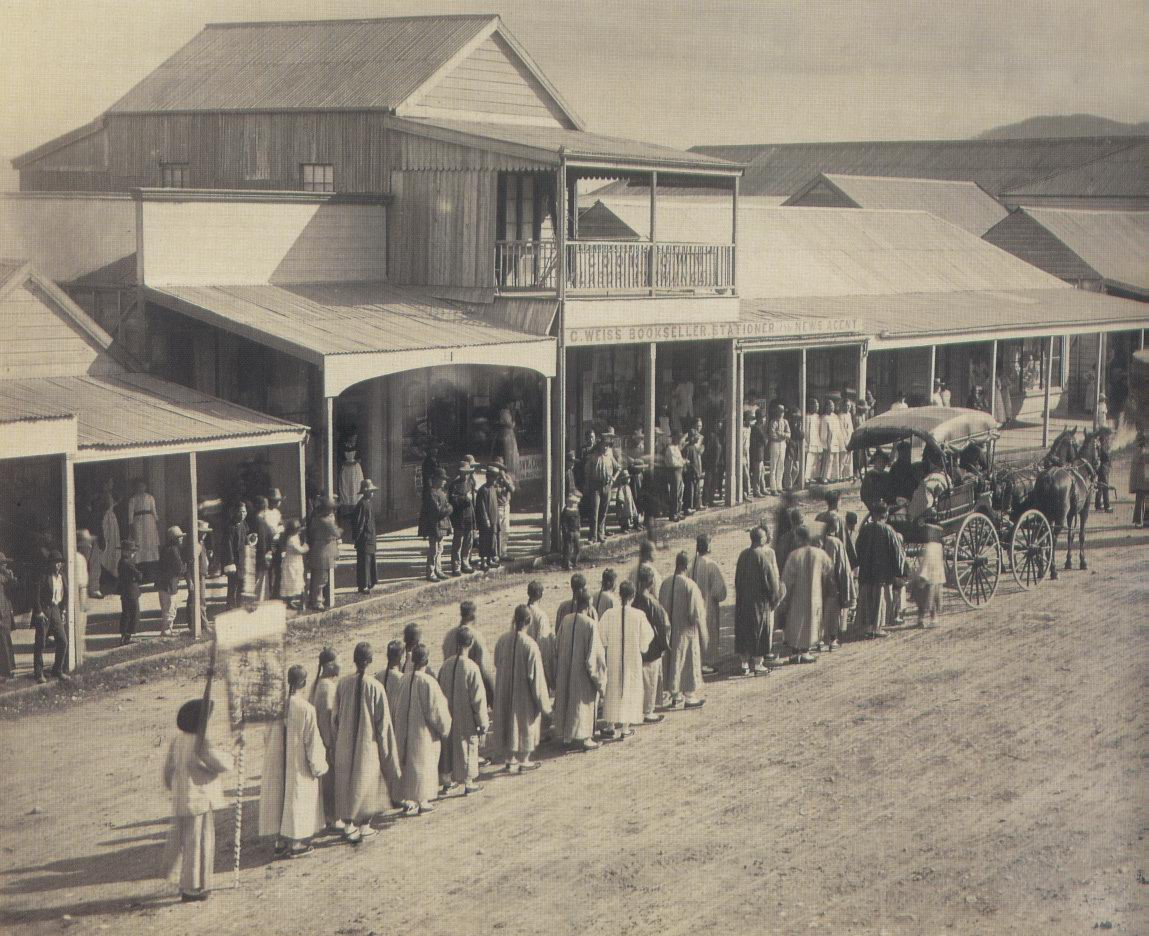 Källa: Tillstånd att användas. 1890